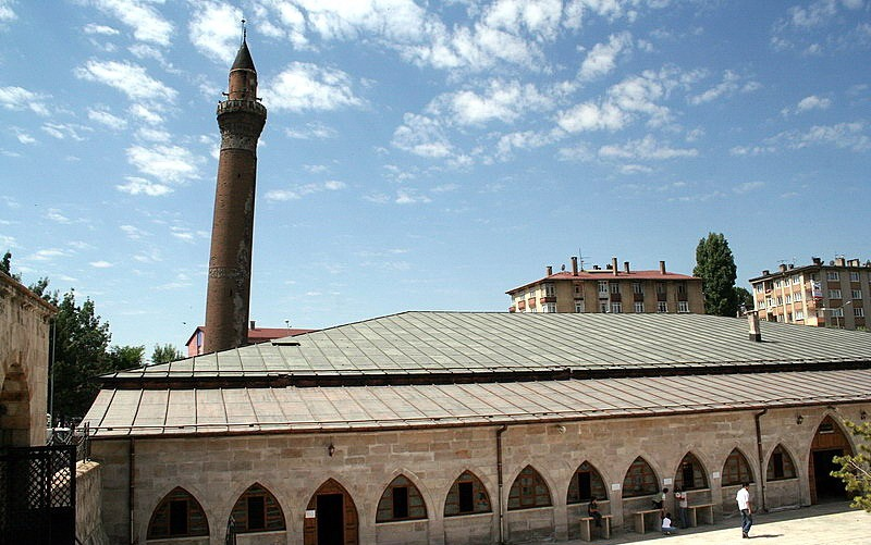 Ulu Camii, Sivas , Turkey